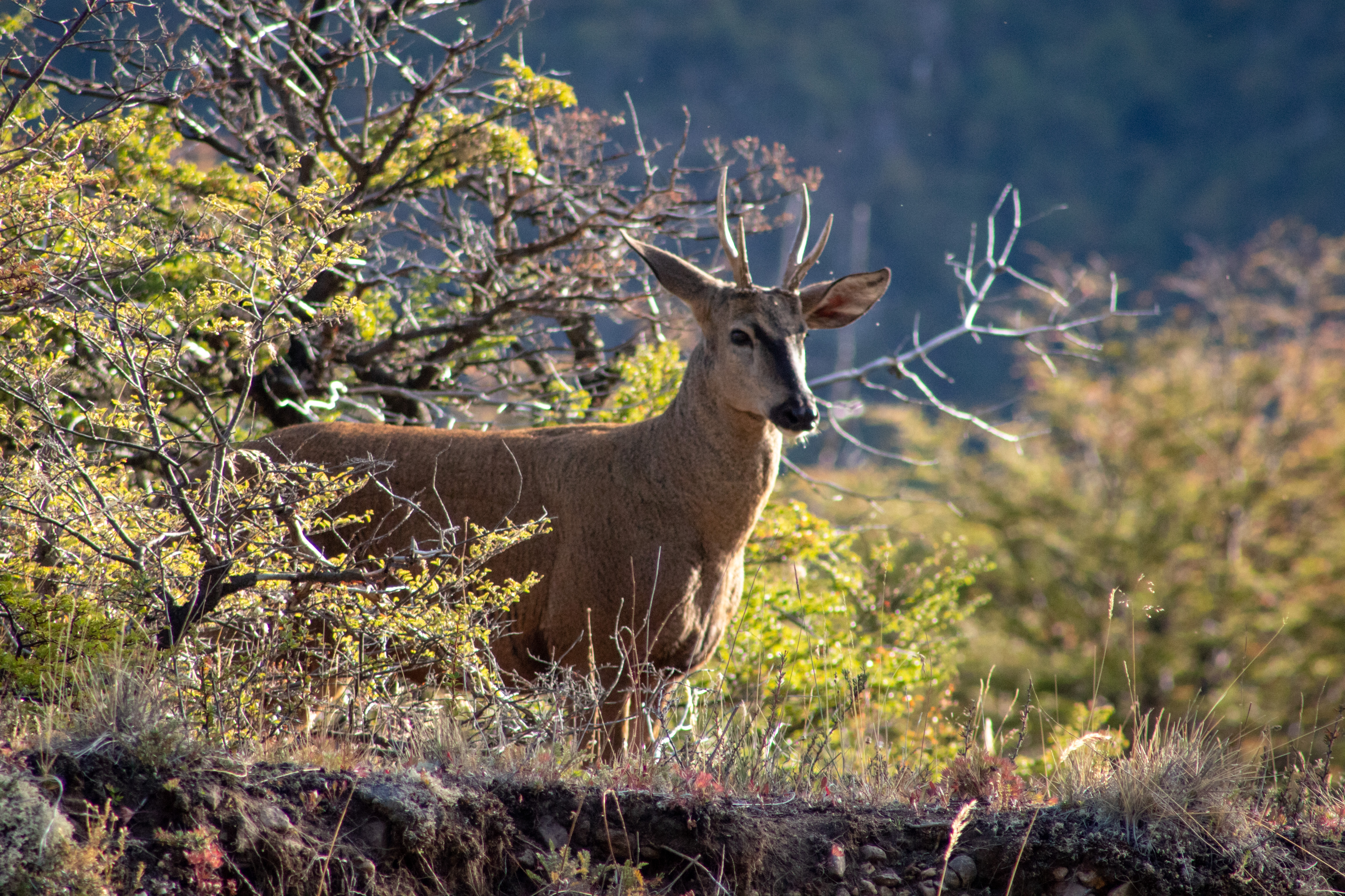 Huemul en el sendero, Parque Nacional Patagonia, Chile.